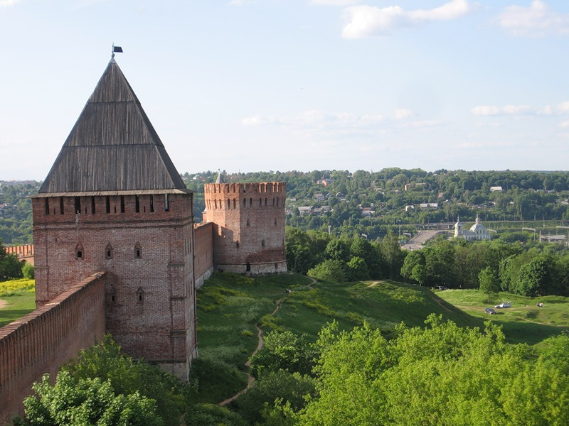 Крепостные стены и башни (Крепость Смоленская) (Смоленская область, Смоленск, сквер Памяти героев, Маршала Жукова улица, Октябрьской Революции улица, Соболева улица, Студенческая улица, Тимирязева улица, центральный парк культуры и отдыха)